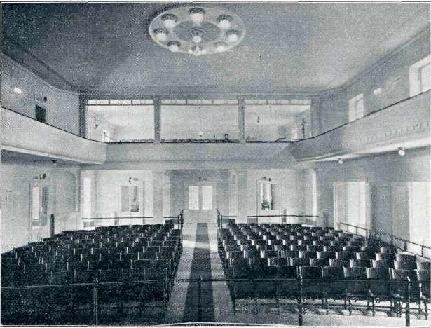 Ljudski dom v Ljubljani, velika dvorana z galerijo.